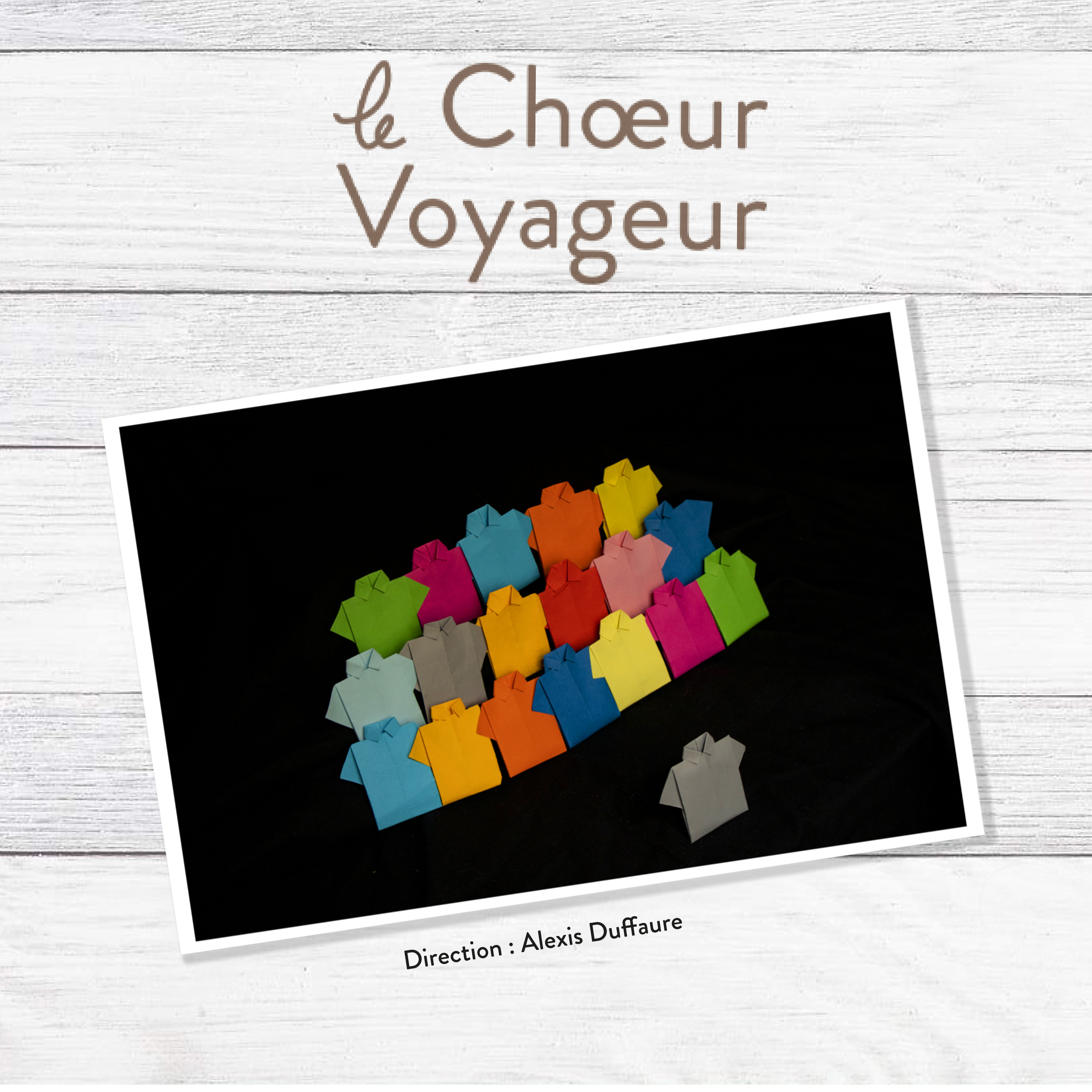 Pochette de l'album éponyme du Chœur Voyageur sorti en fin d'année 2019.